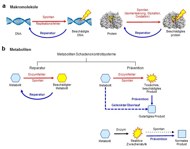 Schadenskontrollsysteme für Metaboliten (b) sind denen von DNA und Proteinen (a) ähnlich.